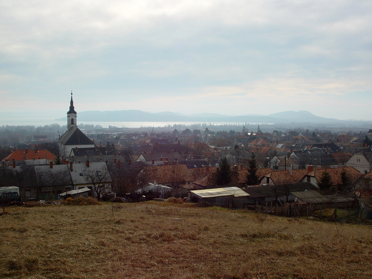 Füred a város feletti dombról